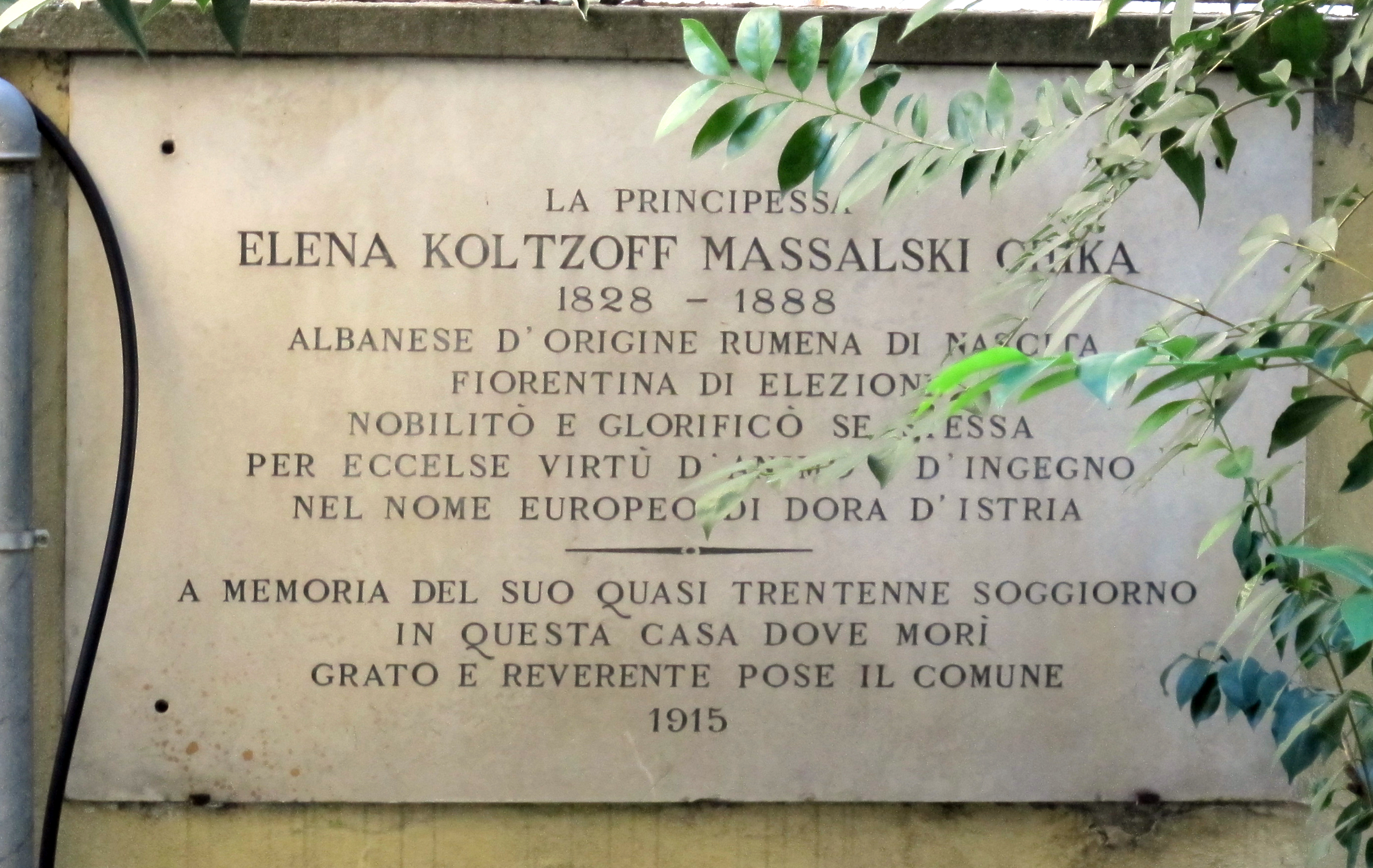 Via Leornado da Vinci 28, Firenze, edificio con targa nel giardino su Dora d'Istria